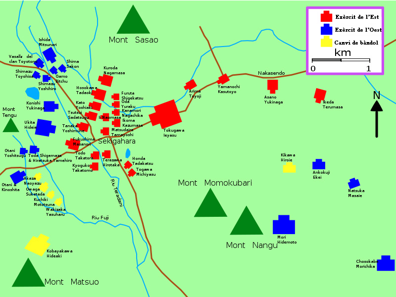 posició estratègica de les tropes durant la batalla